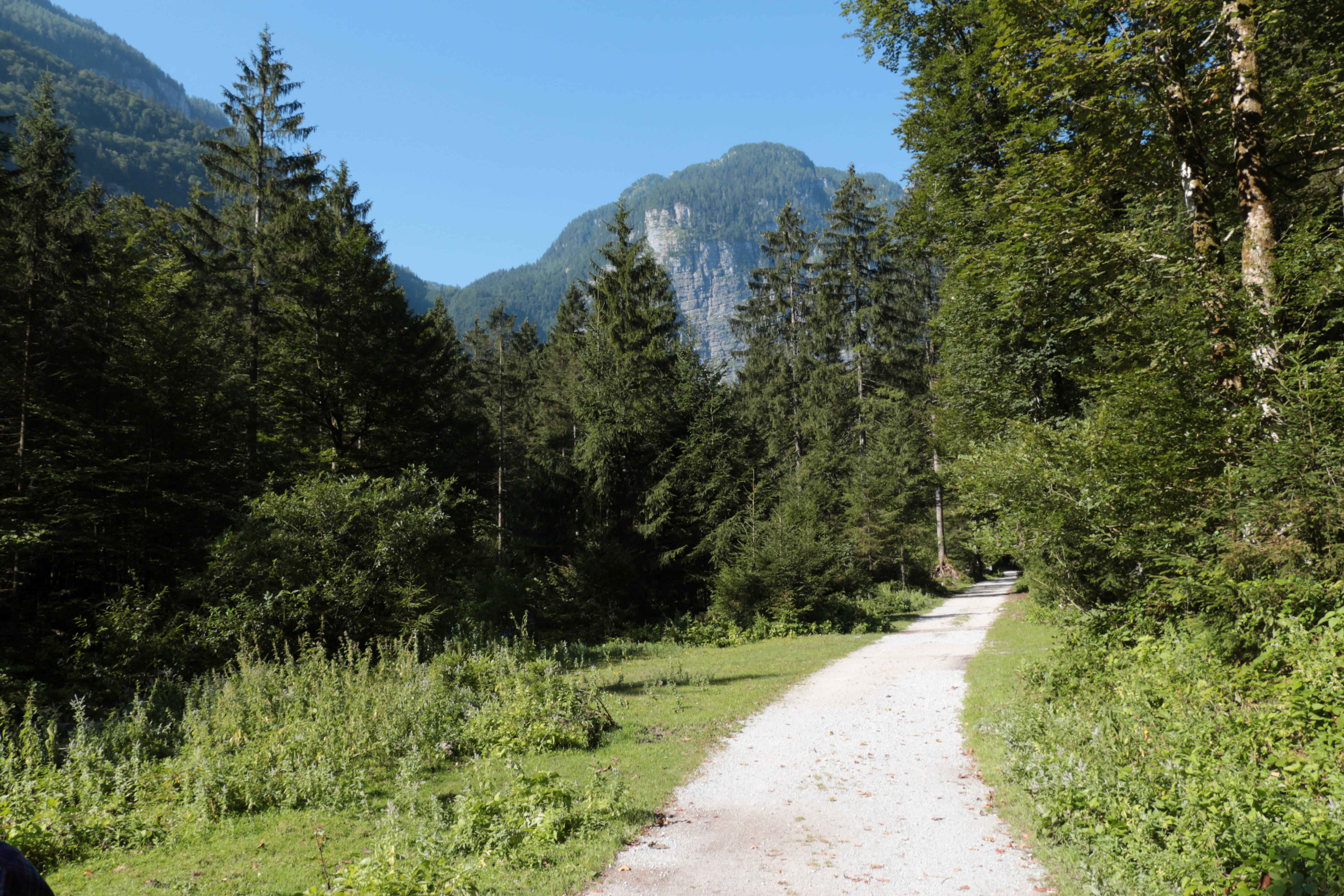 Im Bluntautal in der Salzburger Marktgemeinde Golling im August; Blickrichtung taleinwärts